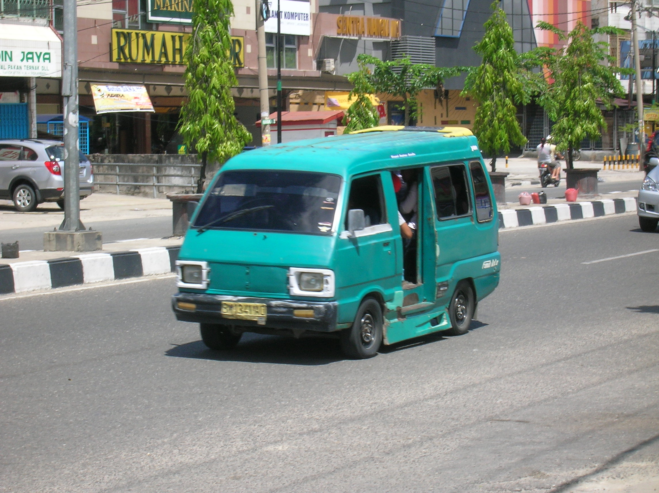 Oplet atau angkutan kota di Kota Pekanbaru, Riau, Indonesia.